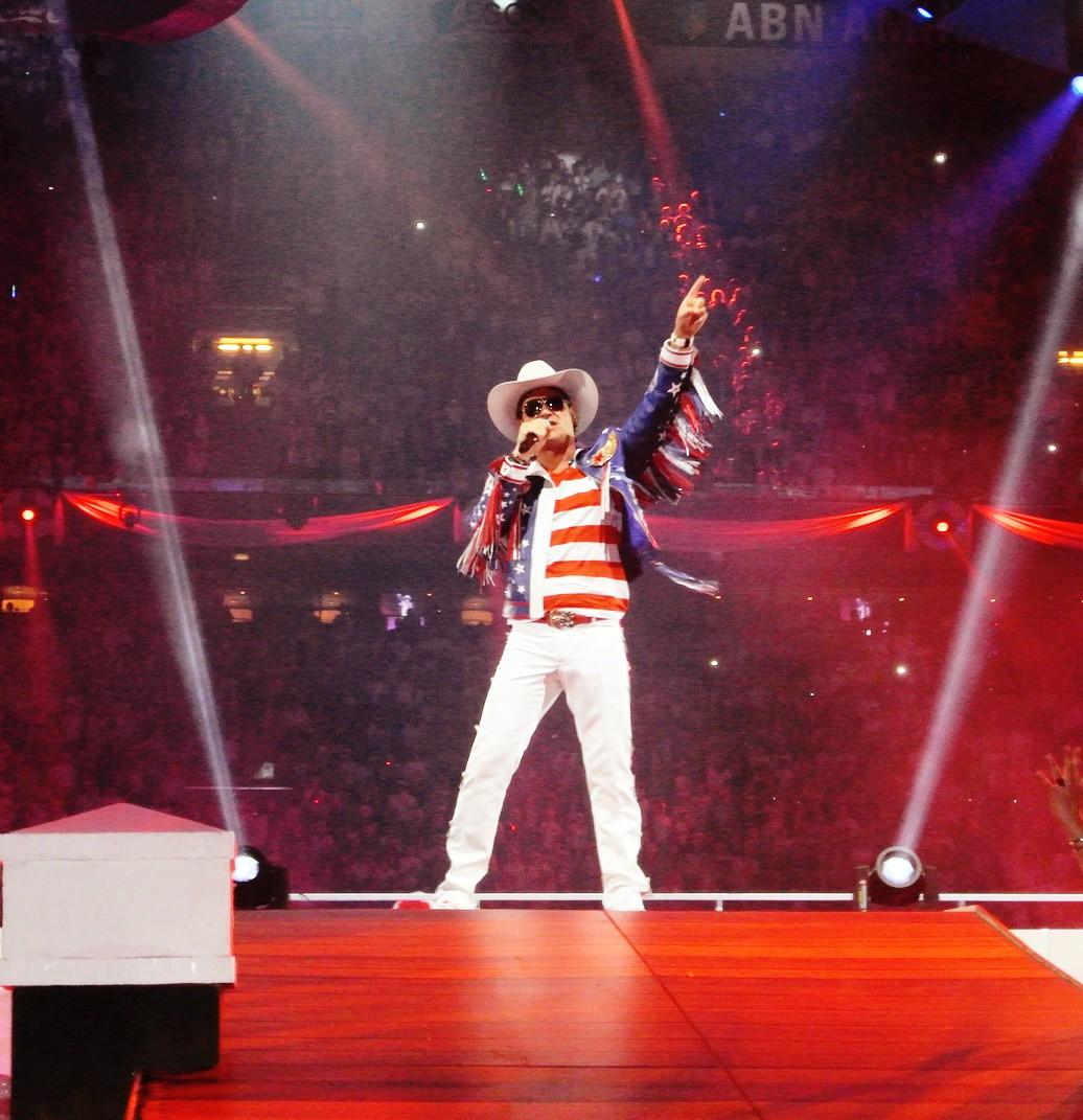 Jeroen van der Boom 2012